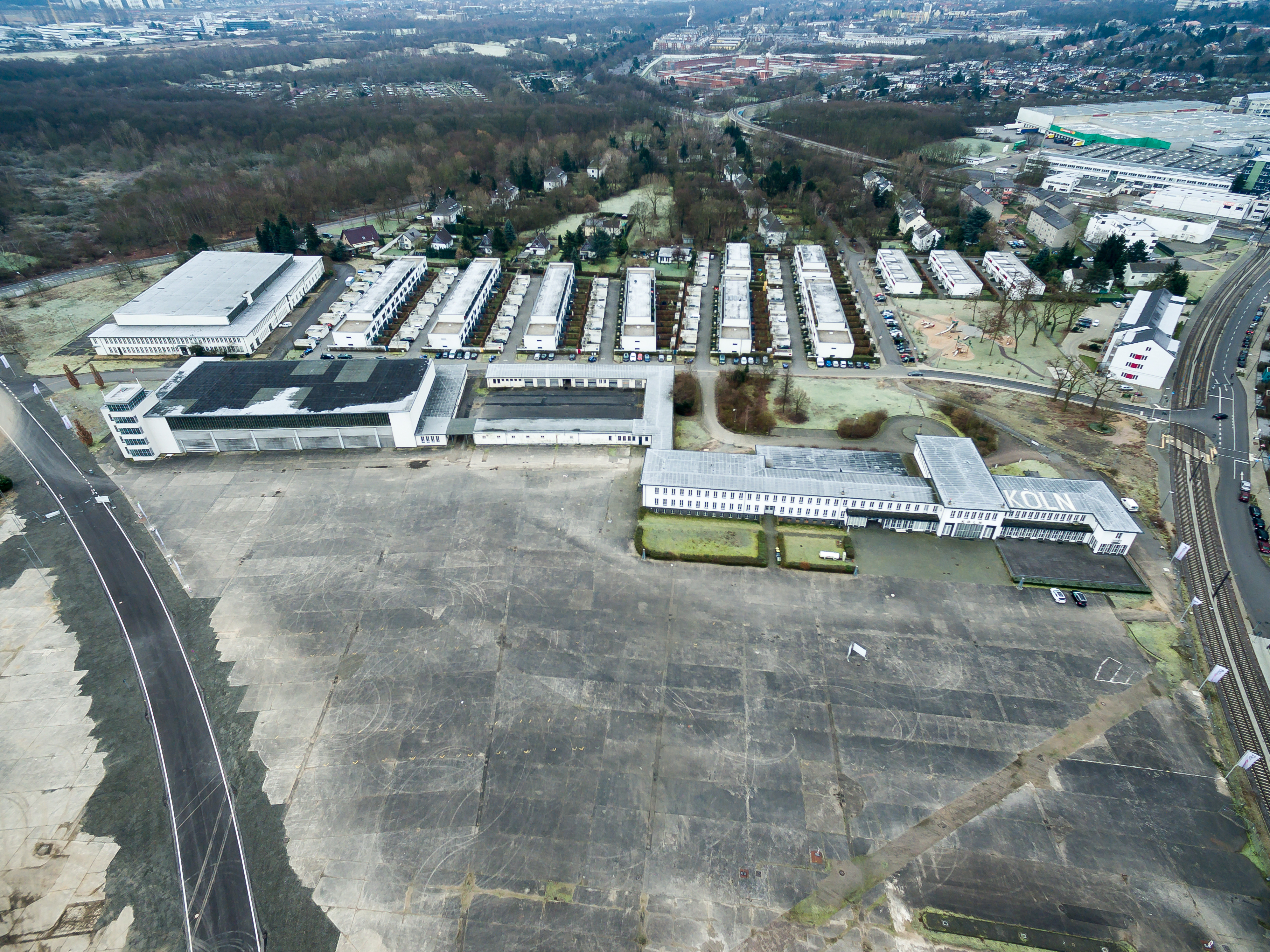 Ehemaliger Flughafen Butzweilerhof, Köln